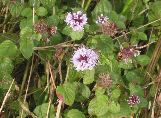 Watermunt; half oktober.